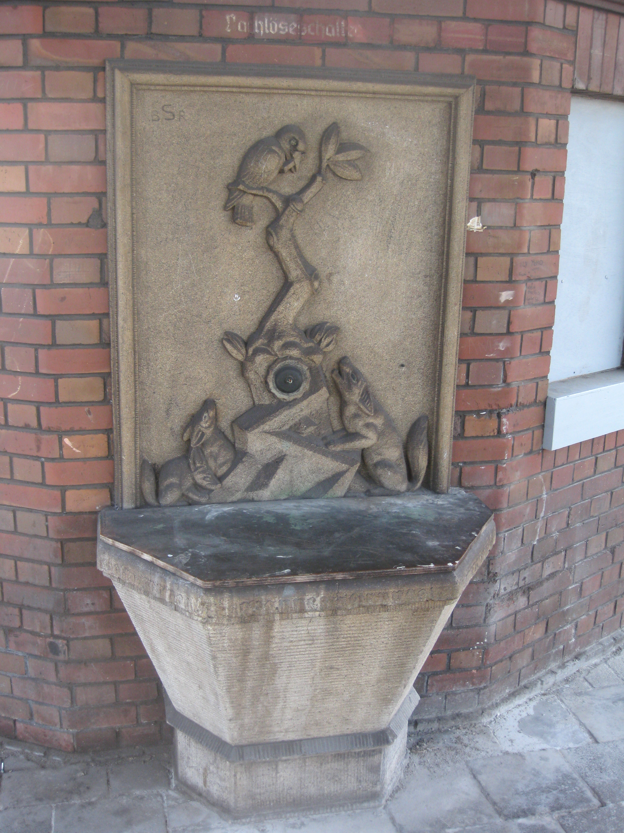 Vogelbrunnen in Hauptbahnhof Offenbach. Entwurf Bruno Schäfer This is a photograph of an architectural monument. It is on the list of cultural monuments of Offenbach am Main